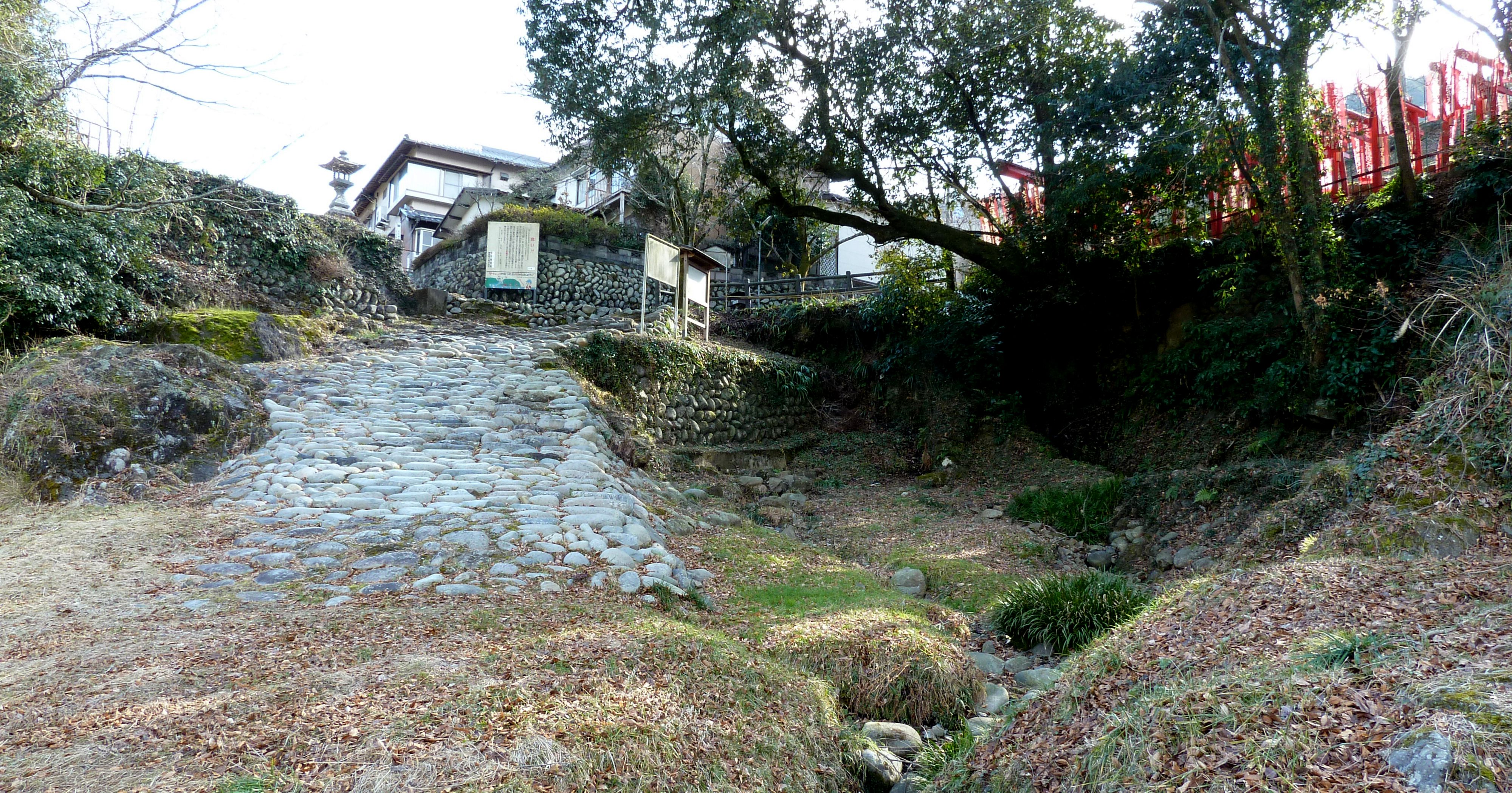 兼山湊跡地